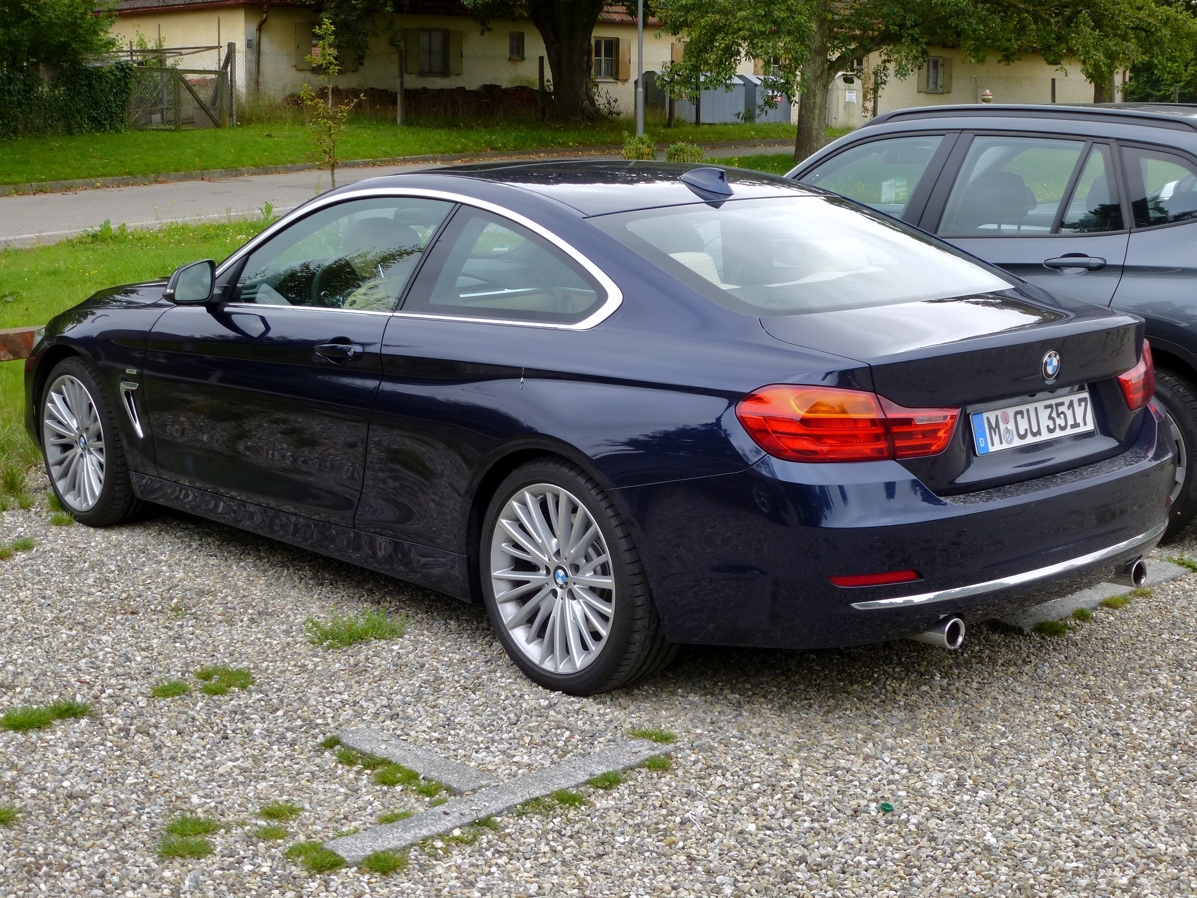 BMW 4er Coupé